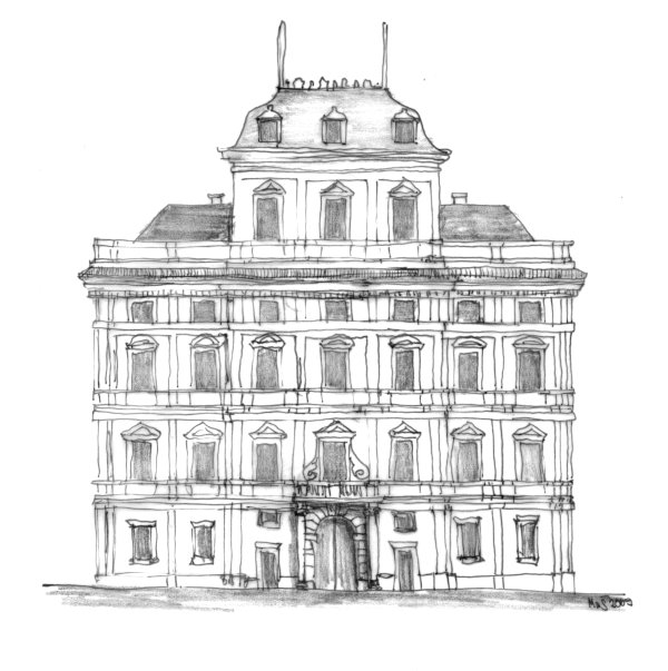 Schématická rekonstrukce barokní podoby arcibiskupského paláce v Praze